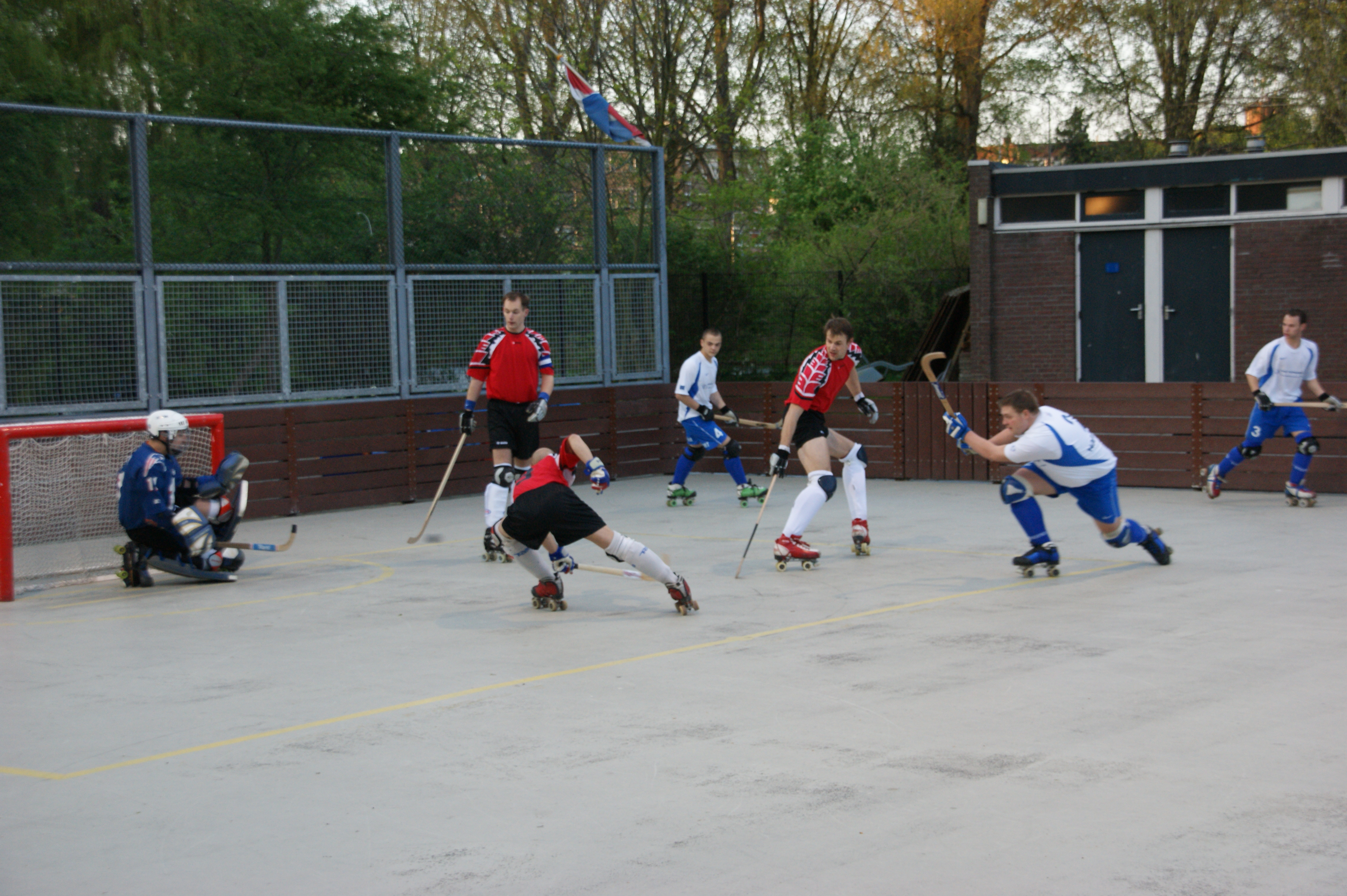 Rolhockeywedstrijd Marathon - AGOR op de Zuiderparkbaan te Den haag